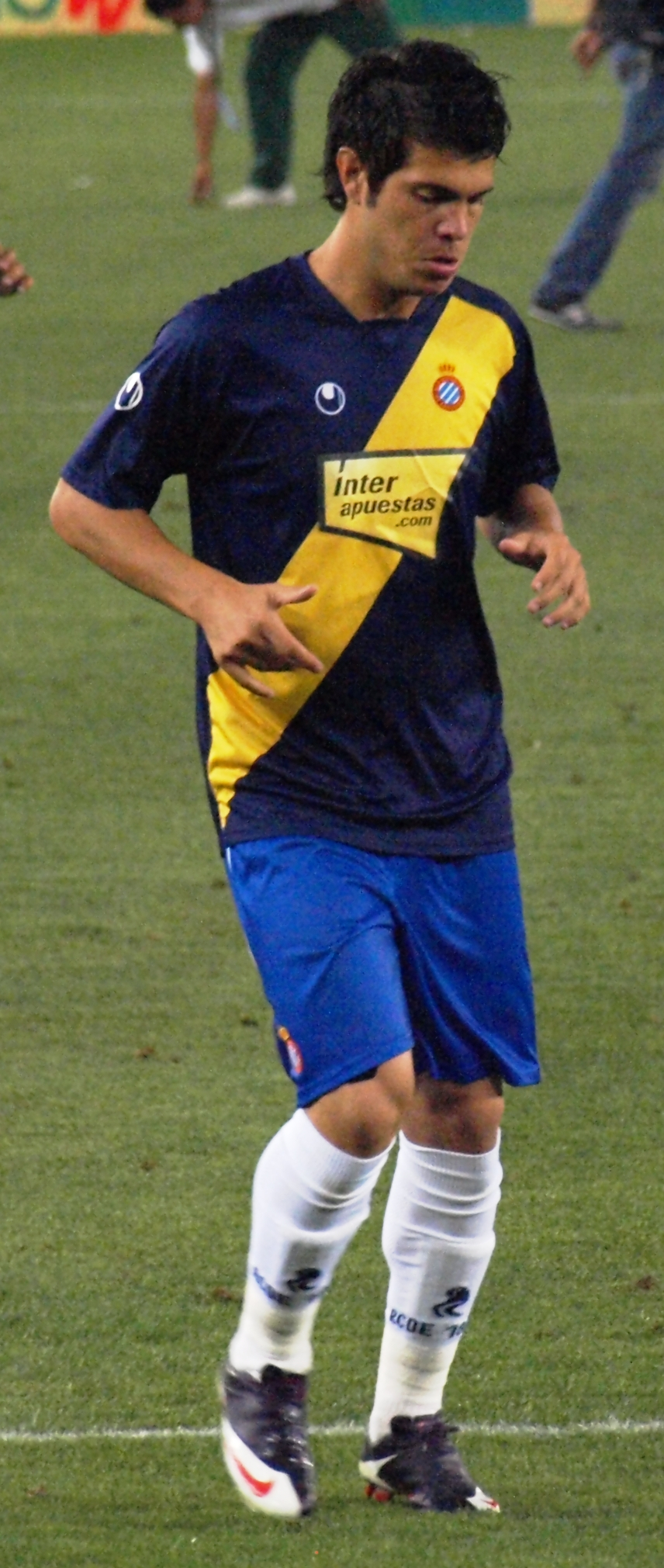 Milan Smiljanić del RCD Español, en el descanso del encuentro que enfrentó a su club con el Liverpool FC, que sirvió para dar por inagurado oficialmente el Estadio de Cornellá-El Prat.